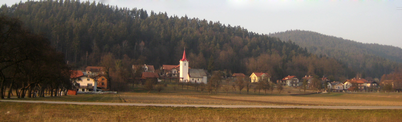 Zaboršt pri Dolu, village in Slovenia